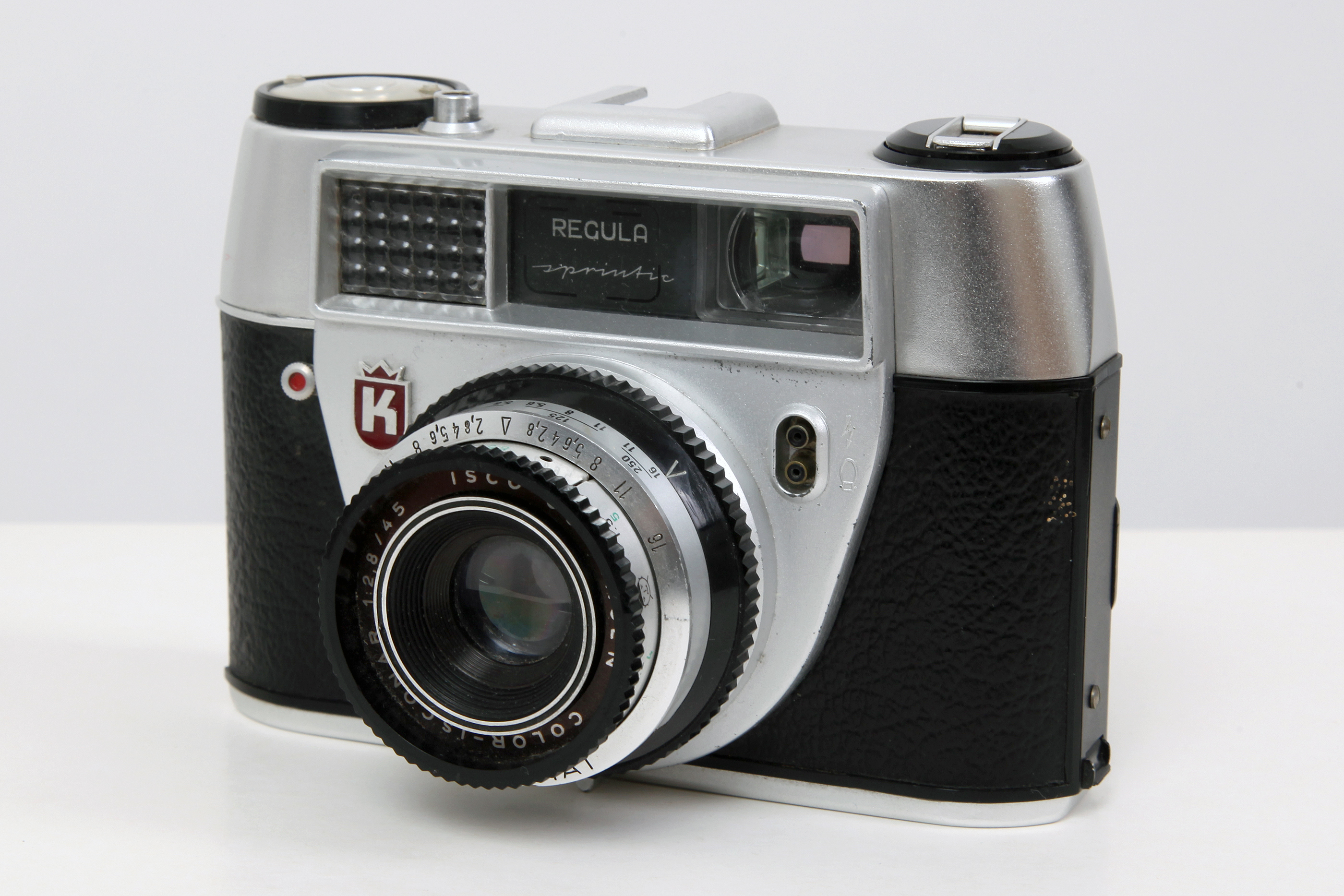 Fotoapparat King Regula Sprintic, Label links